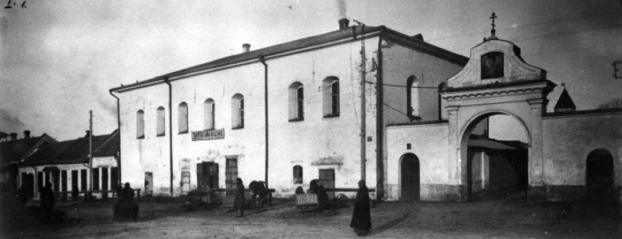 Псковские приказные палаты. Дореволюционное фото